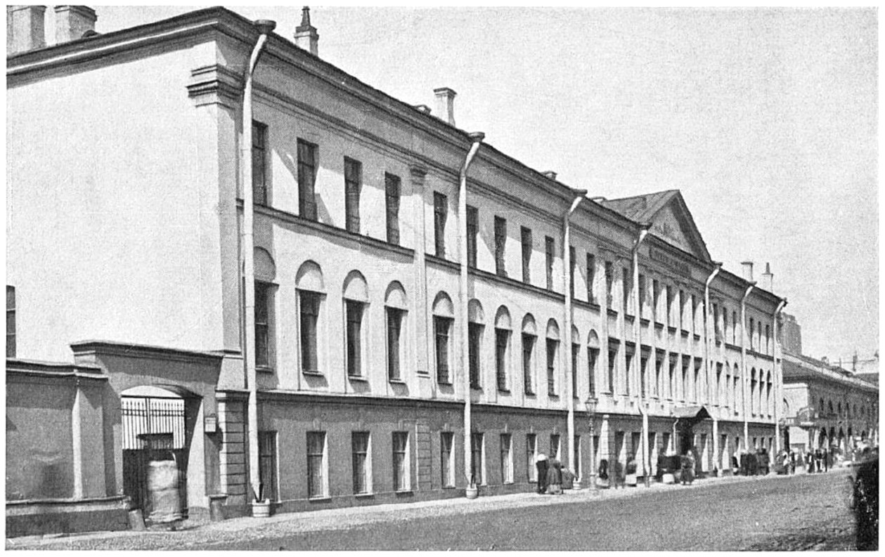 Третья гимназия в Петербурге (1911 г.).